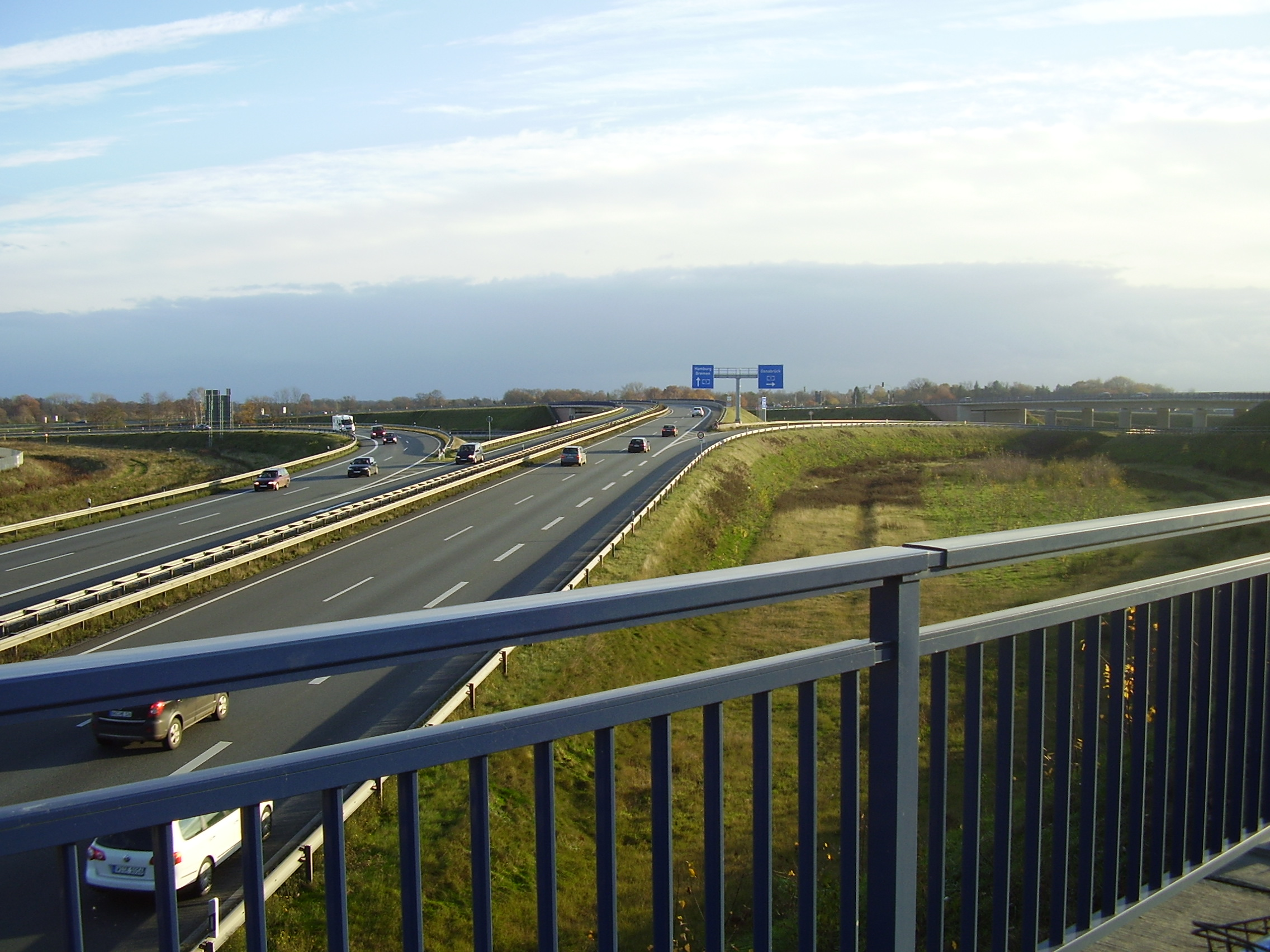 Lückenschluss A28/A1; Autobahndreieck Stuhr, das die aus den Niederlanden kommende A 28 mit der A 1 verbindet.